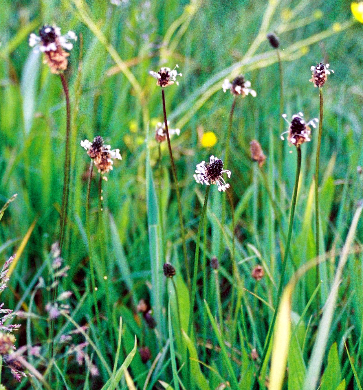 Babka_lancetowata